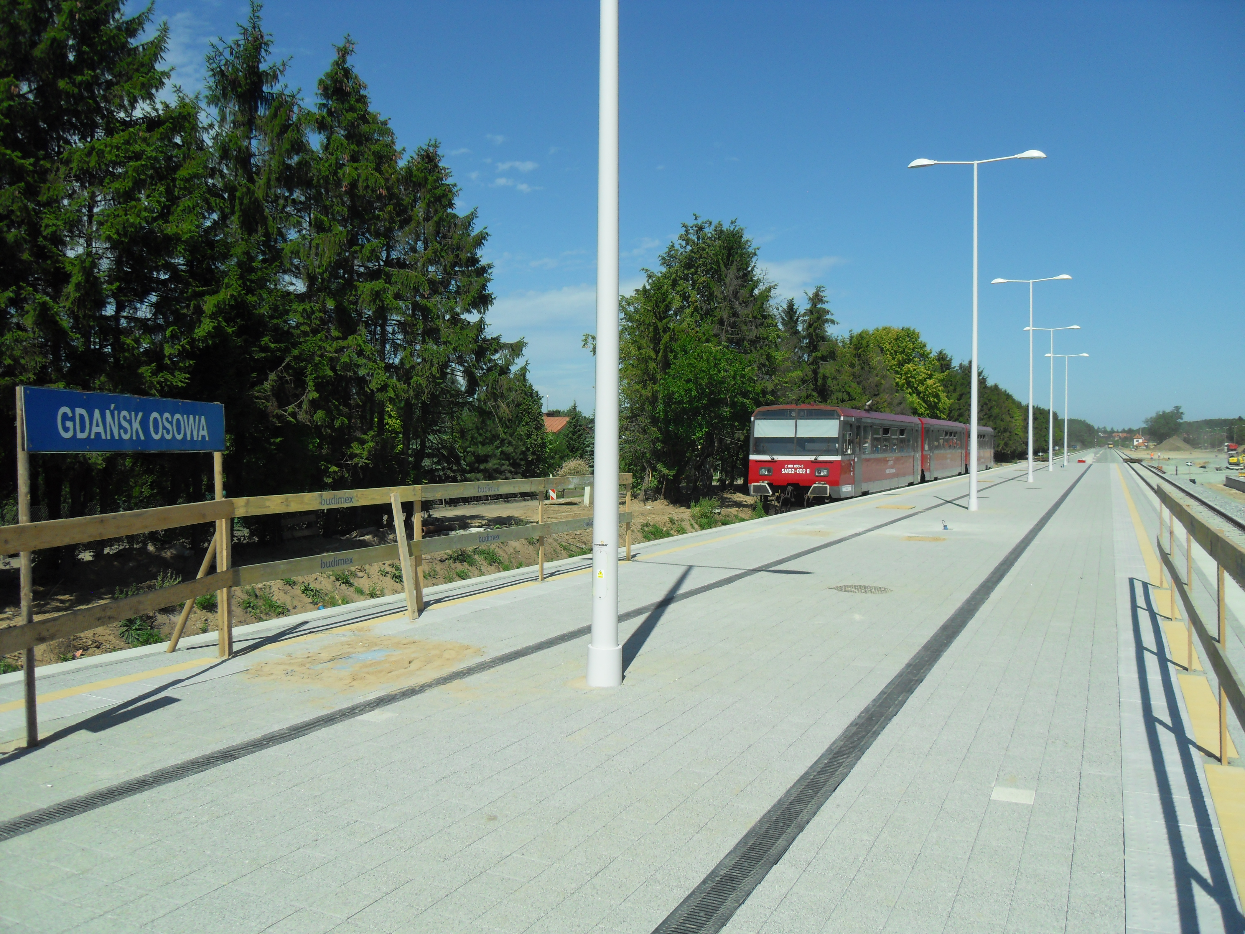 Stacja Gdańsk Osowa poczas przebudowy i SA102-002.